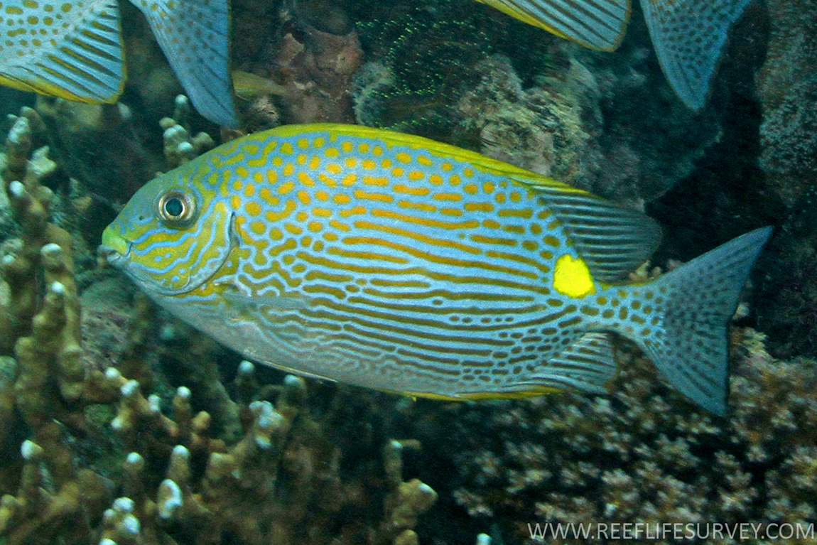 Siganus lineatus en isla Lizard, Gran Barrera de Arrecifes, Australia